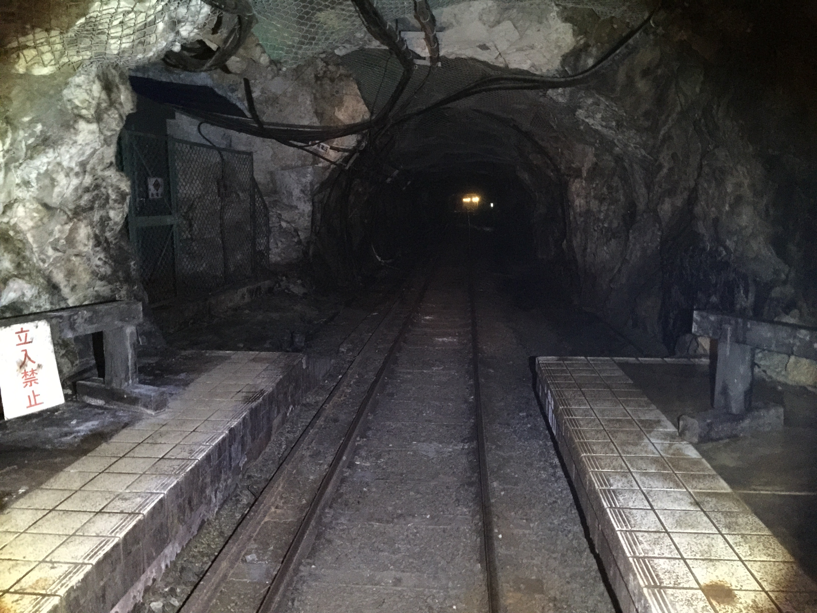 串木野鉱山の坑道（トロッコ）